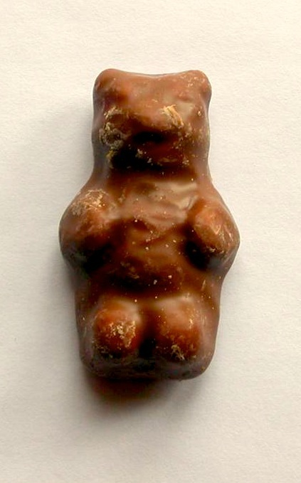 Bilde av en bamsemums på hvit bakgrunn.